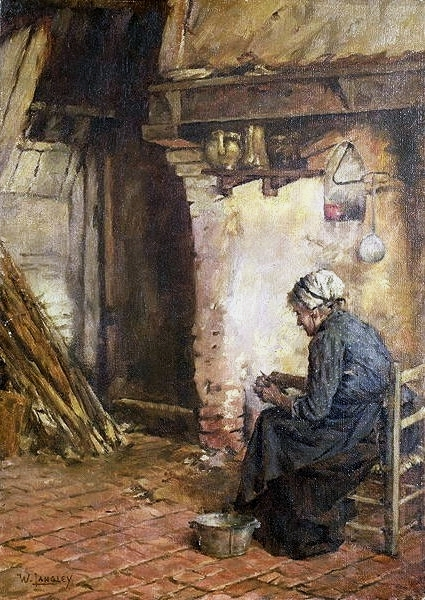 Old Woman Peeling Potatoes